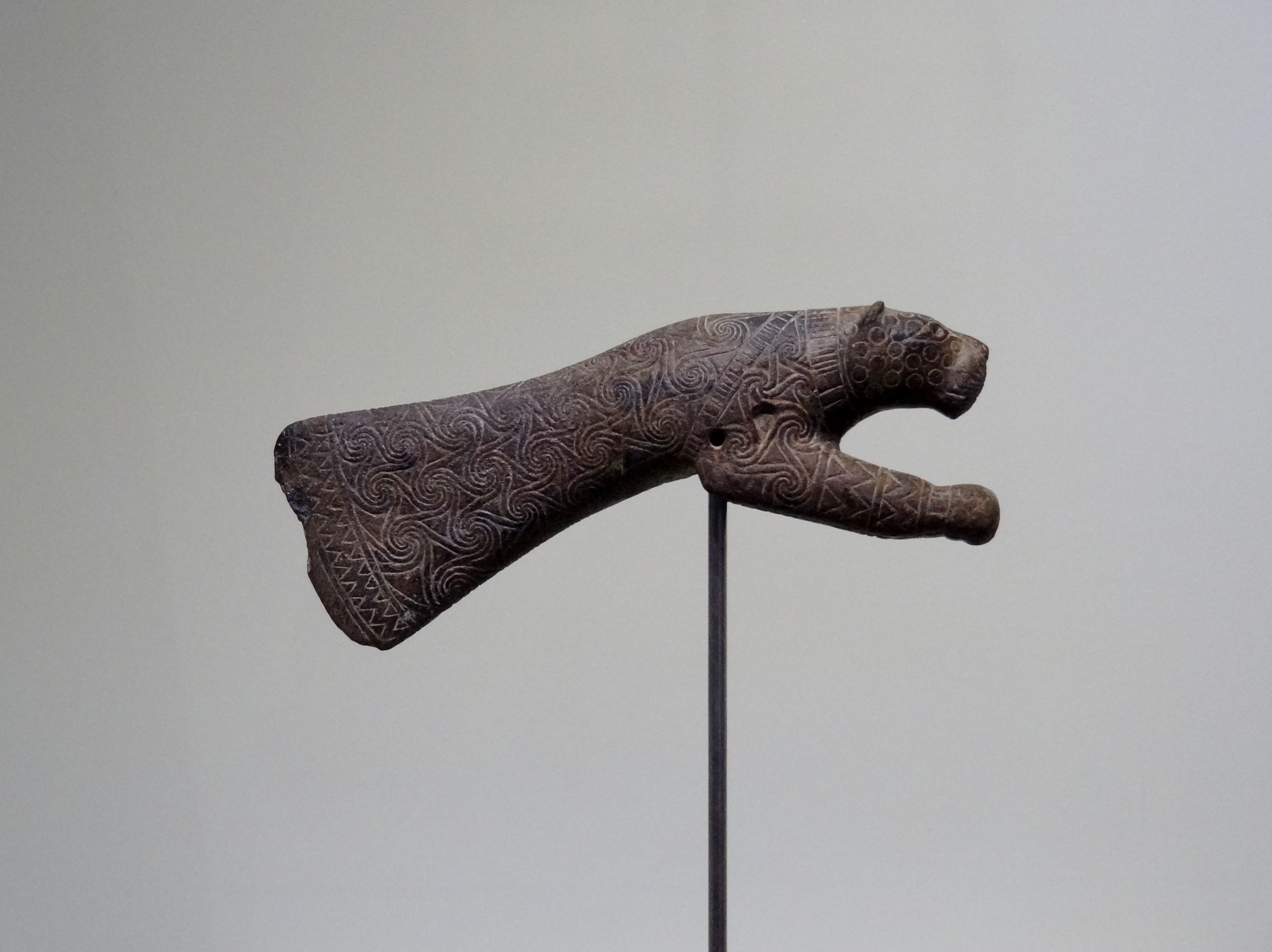 Kopf eines Zepters aus Schiefer in Form eines Leoparden (1650–1600 v. Chr.) aus Mallia, ausgestellt im Archäologischen Museum Iraklio, Kreta, Griechenland